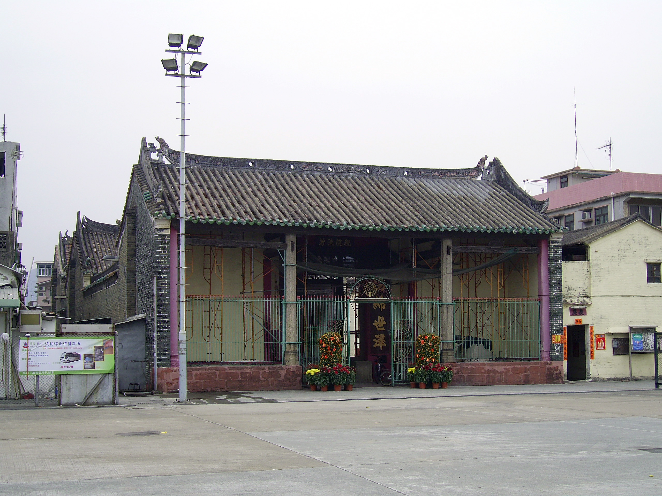 中文（香港）: 廈村鄧氏宗祠